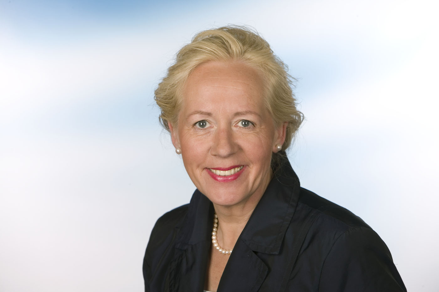 Anette Meyer zu Strohem, Mitglied des Niedersächsischen Landtags